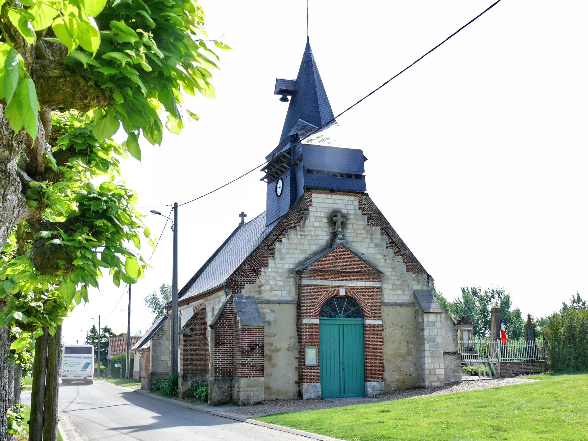 Le Gallet (Oise - Picardie - France) : église Saint-Jacques